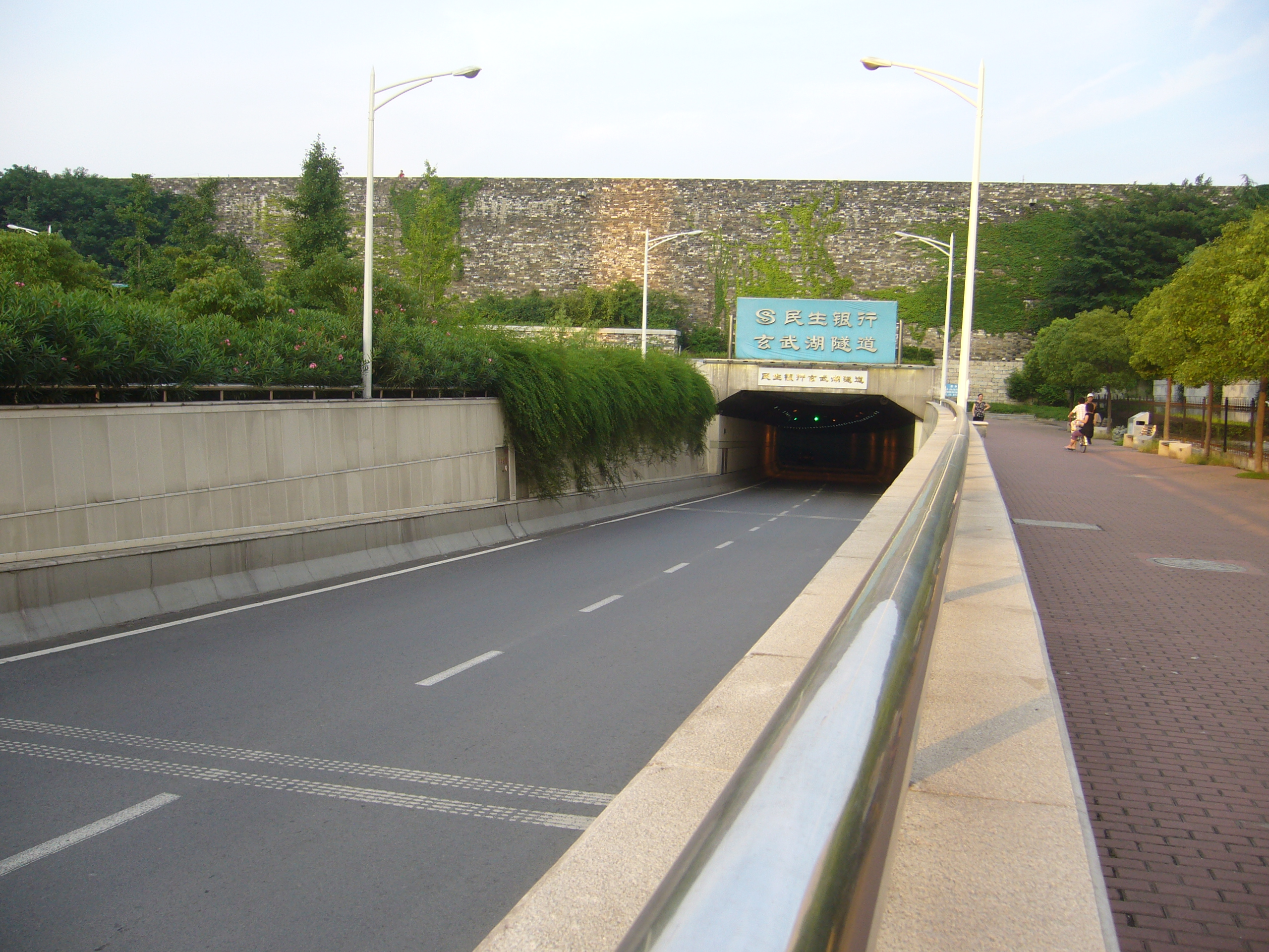 城墙下的玄武湖隧道